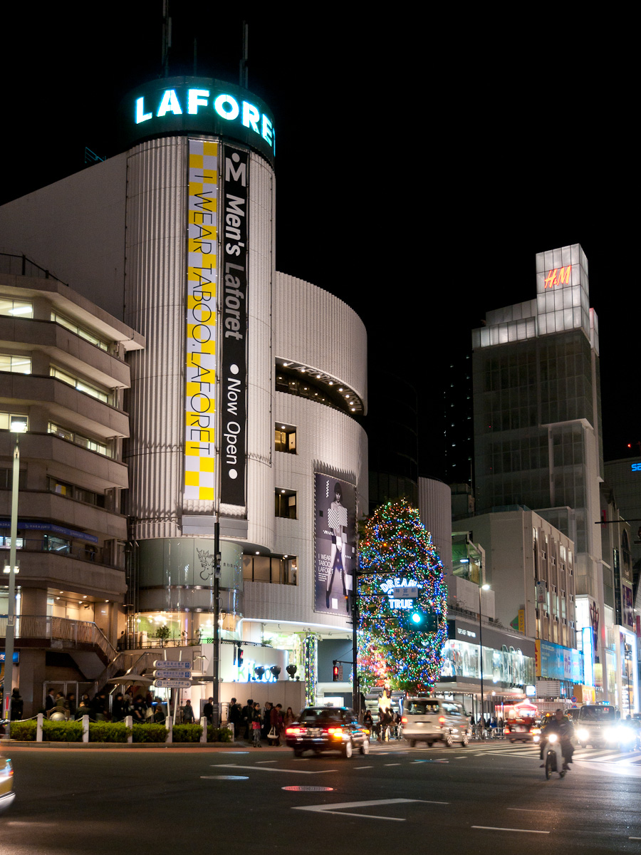 明治通り神宮前交差点とラフォーレ原宿、東京都渋谷区神宮前。